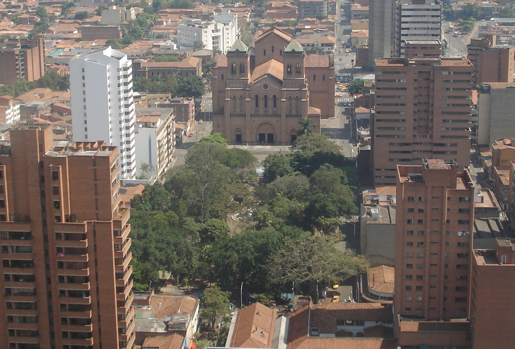 Parque Bolívar de Medellín, desde el Edificio Coltejer. Colombia